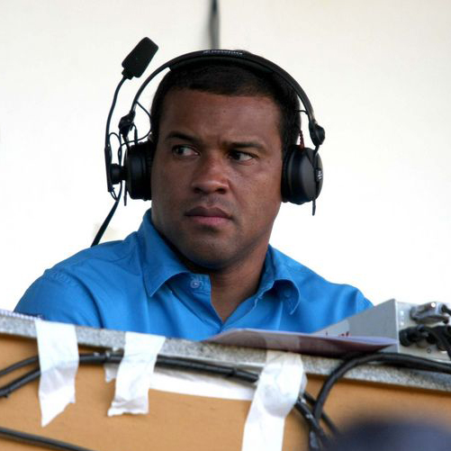 Müller, ex-jogador de futebol, hoje comentarista esportivo.